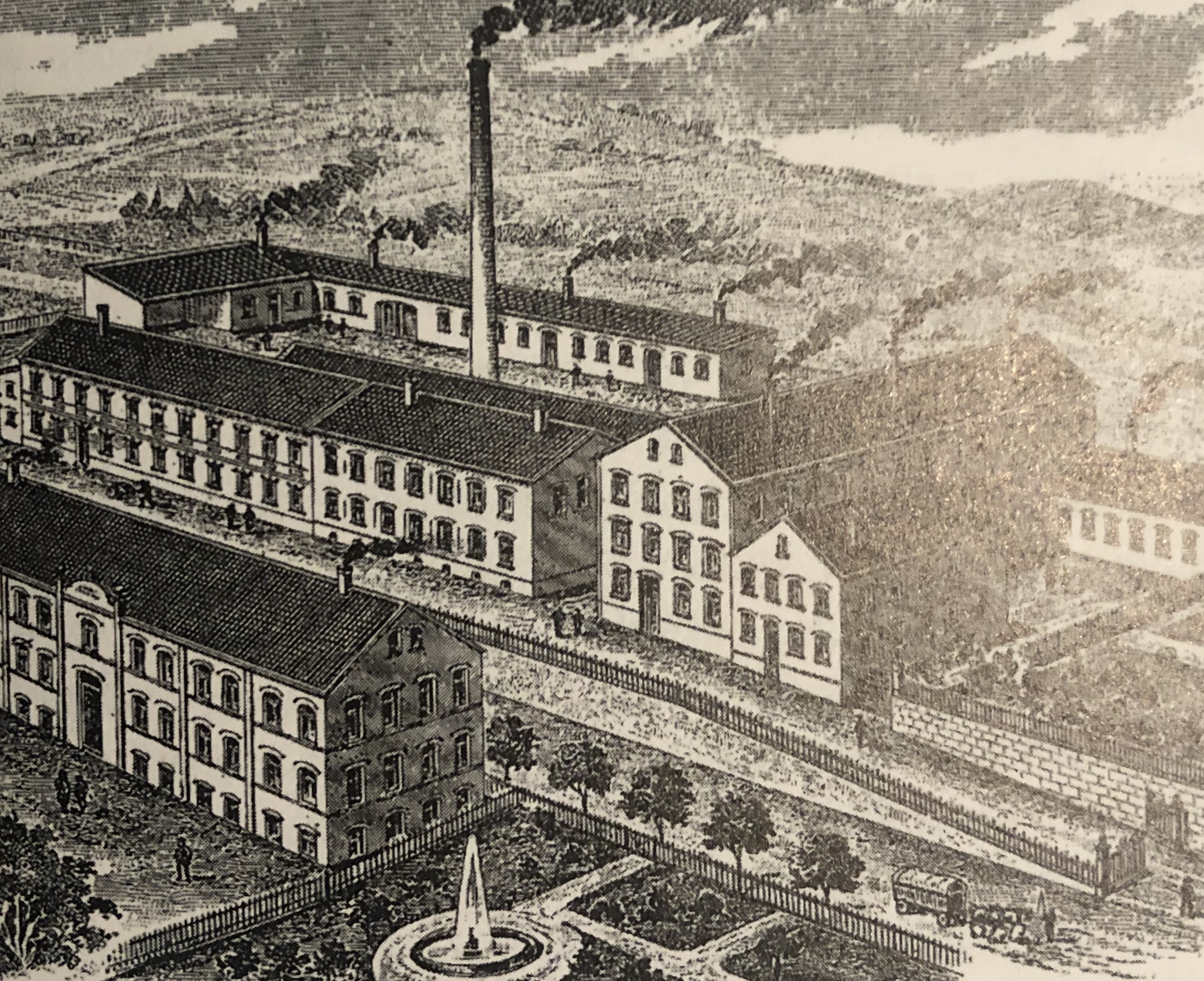 Briefkopf der Firma Schulte-Ufer aus Sundern aus dem Jahr 1908